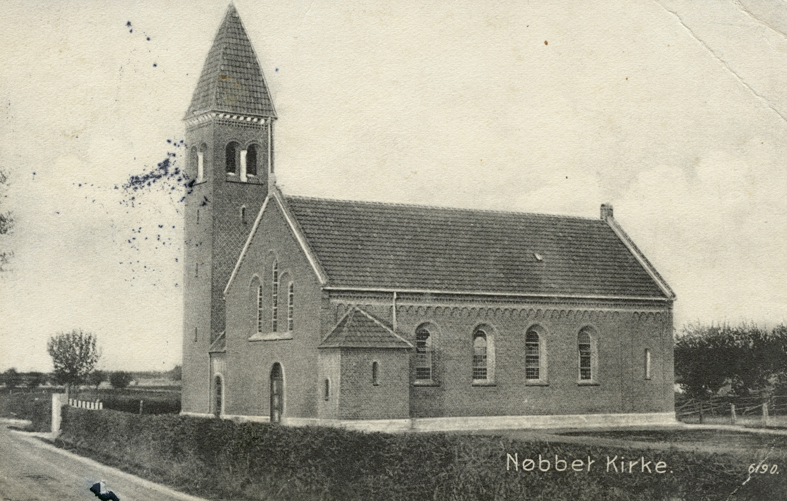 Nøbbet Kirke i Horslunde Sogn - historisk postkort fra Vest-Lolland. Kirken er bygget i 1908